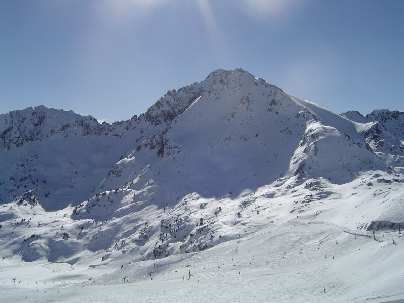 Principado de Andorra Invierno del 2006